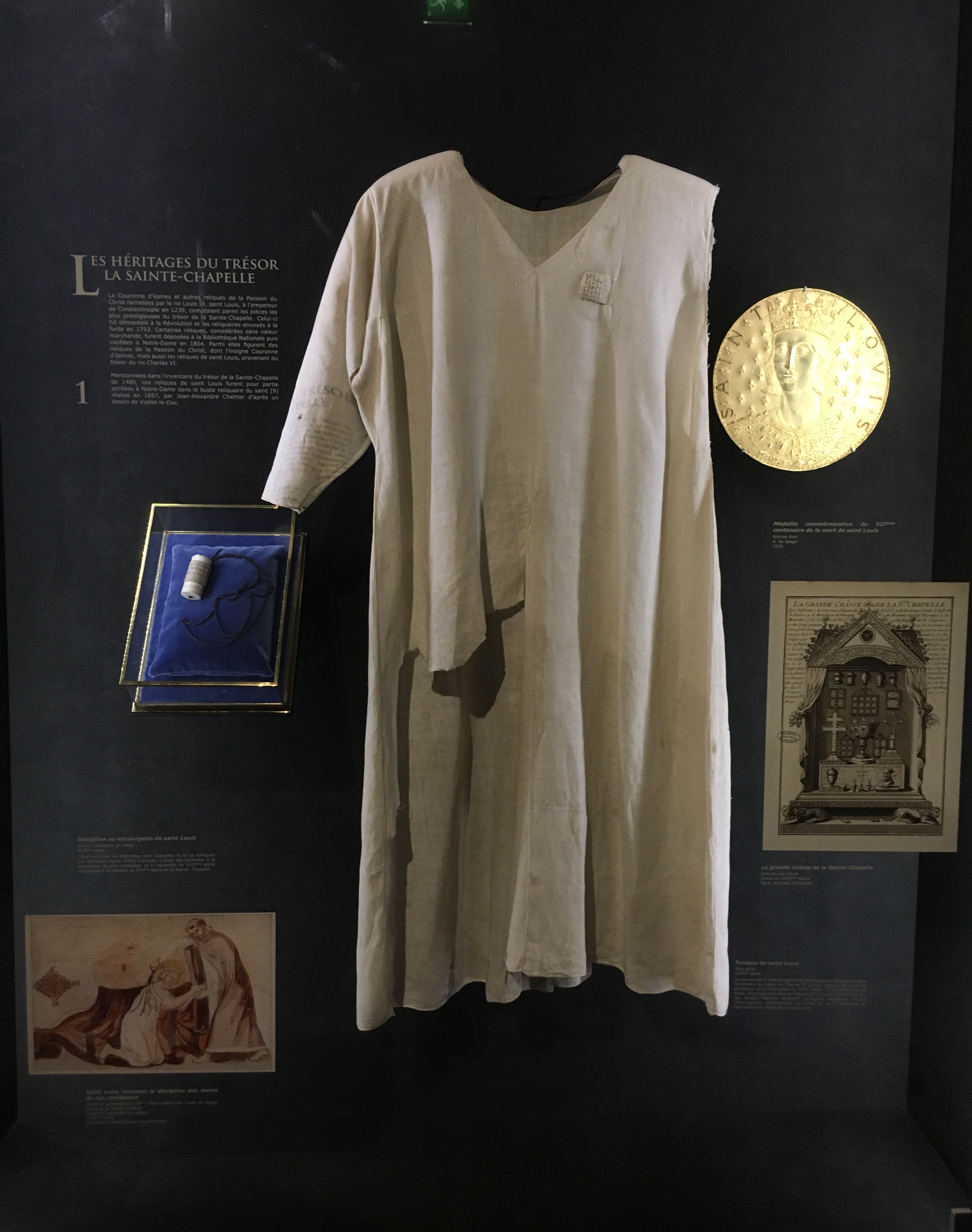 Les trésors de Saint Louis dans le trésor de Notre-Dame de Paris, le 12 mai 2018.